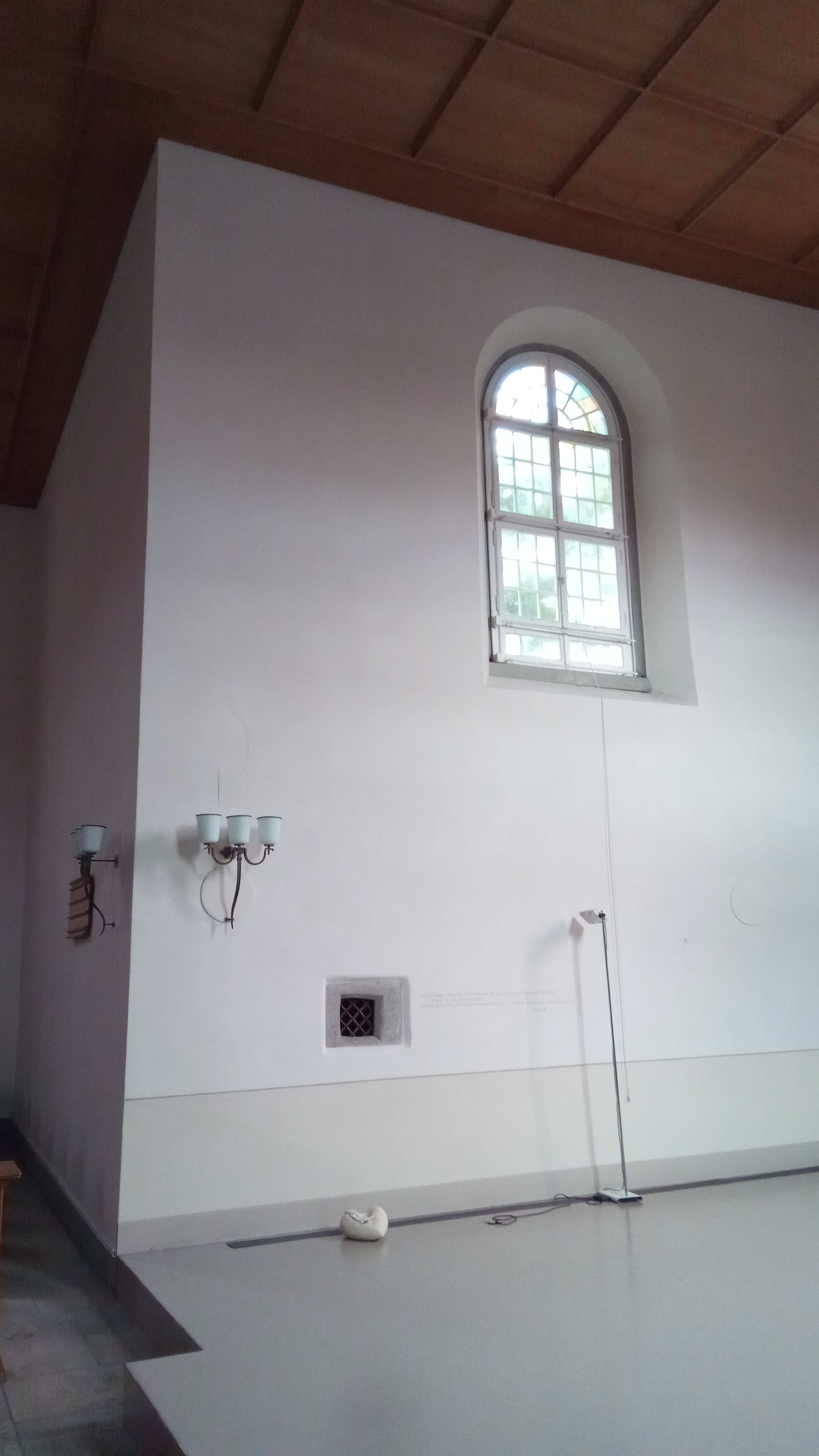 Das Innenfenster der St. Wiboradakapelle in der St. Galler St. Mangenkirche